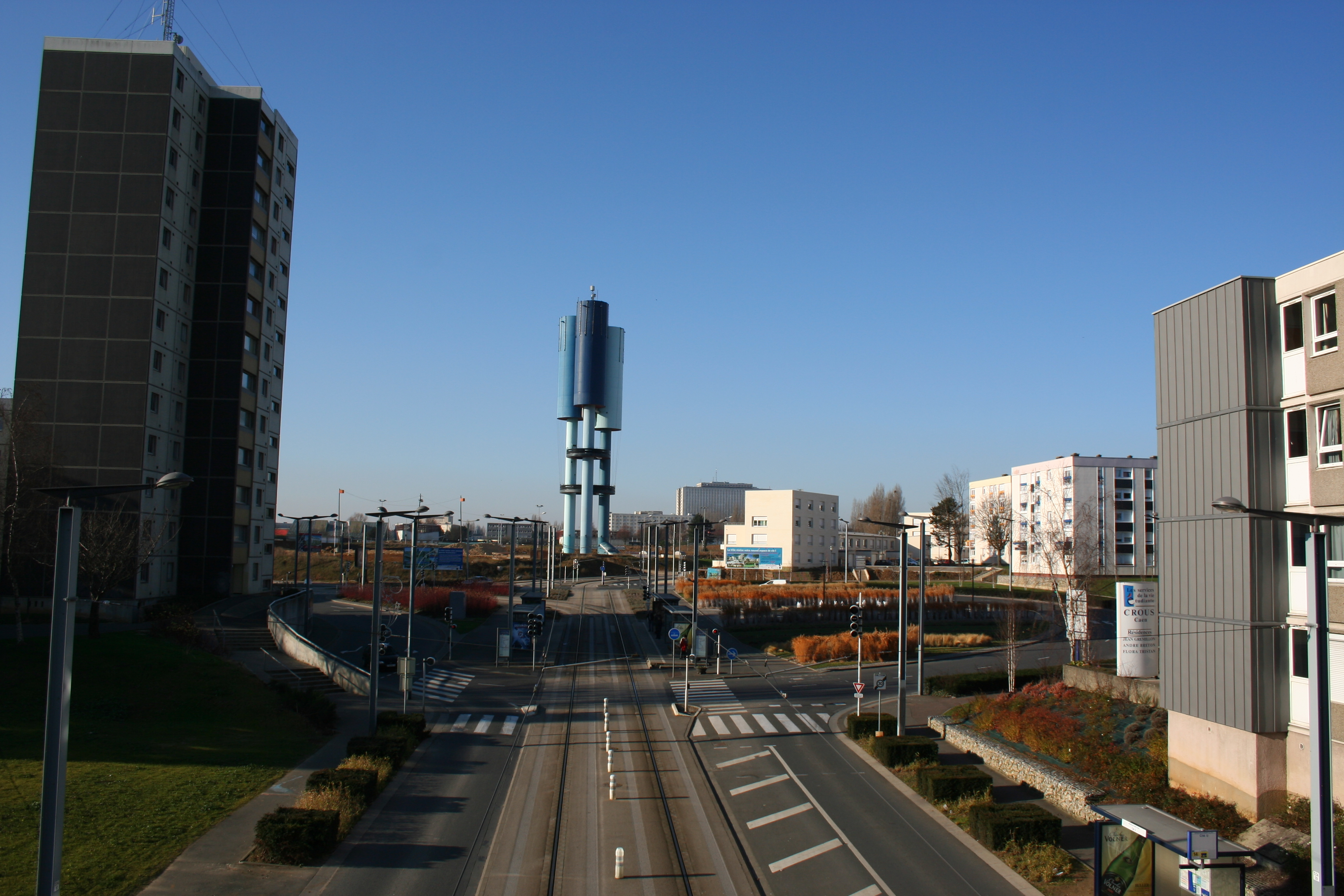 Place de la Fontaine vue de la passerelle menant à la Haute Folie, Hérouville St Clair